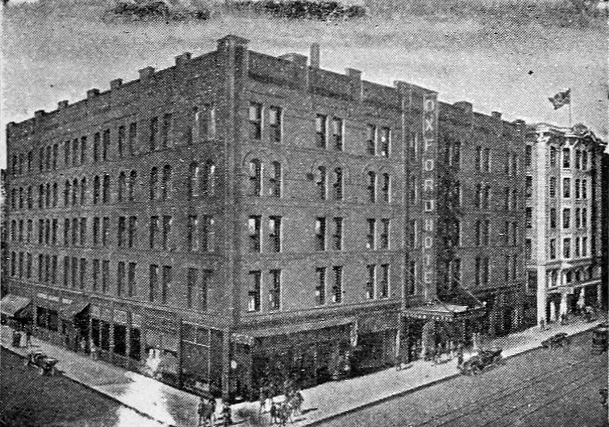 Oxford Hotel, Denver, Colorado.